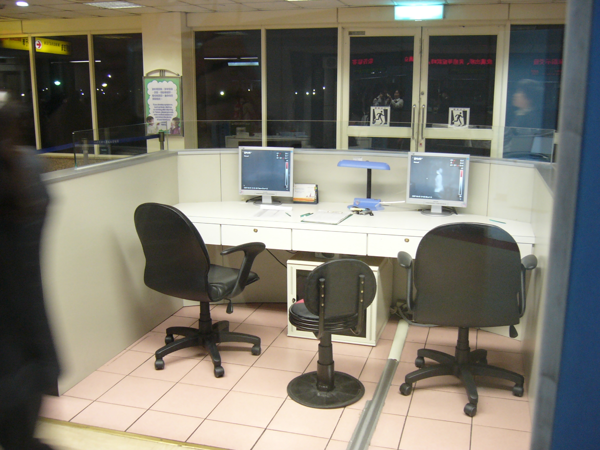 臺灣桃園國際機場第一航廈，行政院衛生署疾病管制局發燒篩檢站內側。